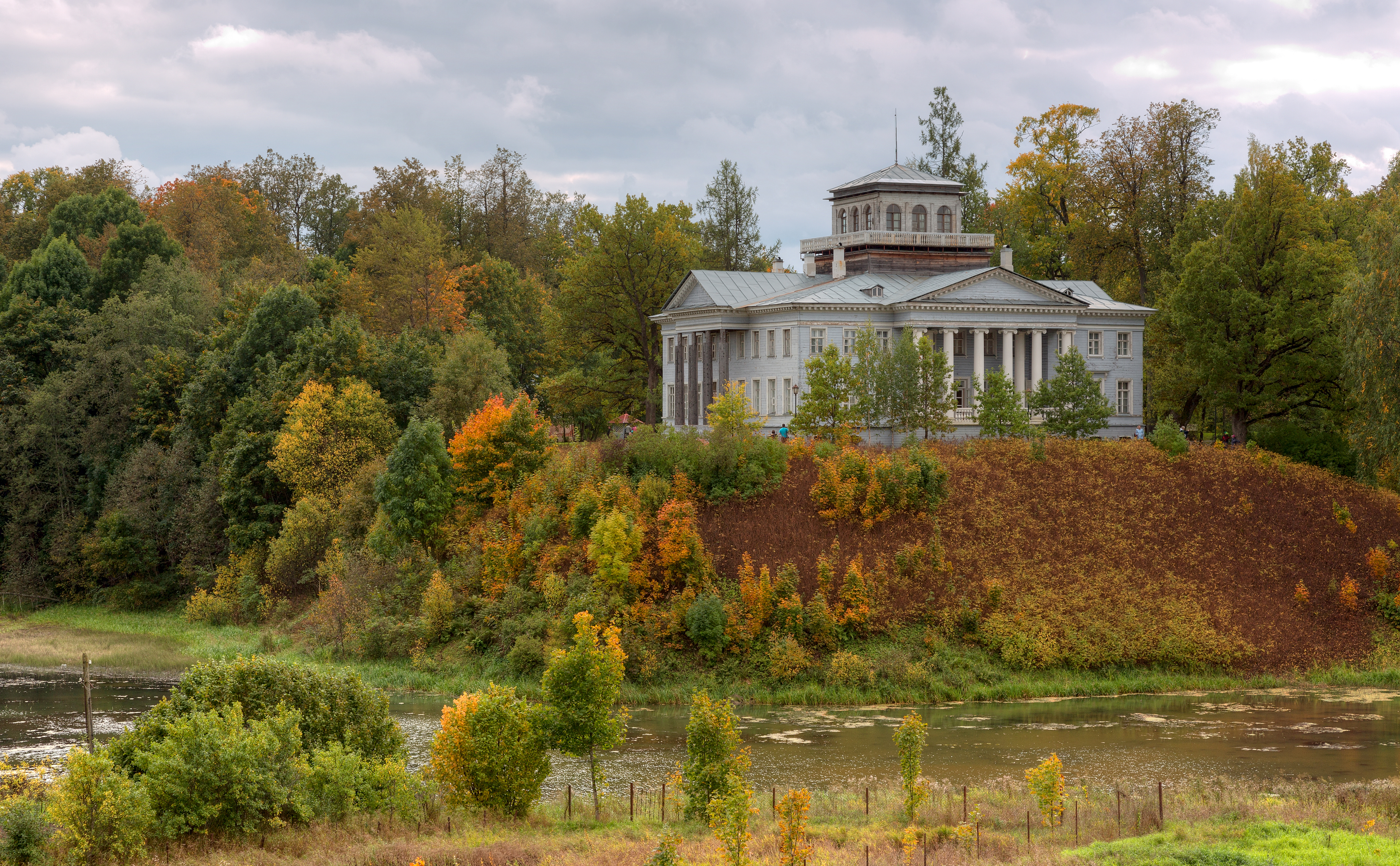 Парк: Рождествено, Гатчинский район, Ленинградская область